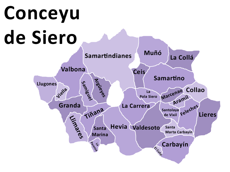 Mapa del Conceyu de Siero